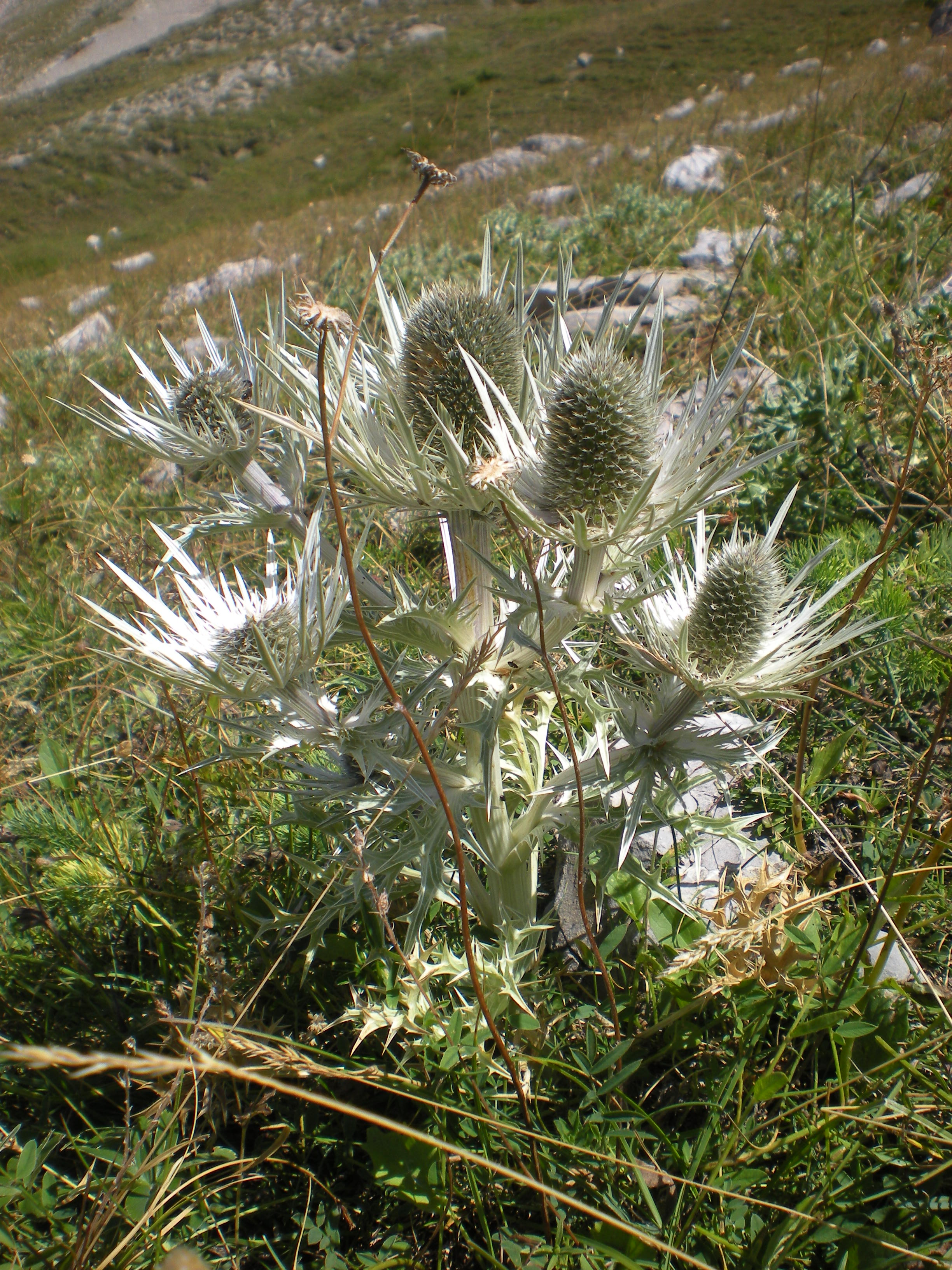 Le panicaut épine blanche des Alpes dans un alpage du Dévoluy.